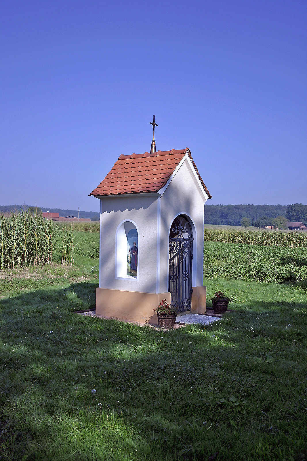 Kapela Svetega srca Jezusovega, Gornji Črnci. Sacred heart chapel, Gornji Črnci. Heilige Herz-Jesu Kapelle, Gornji Črnci.